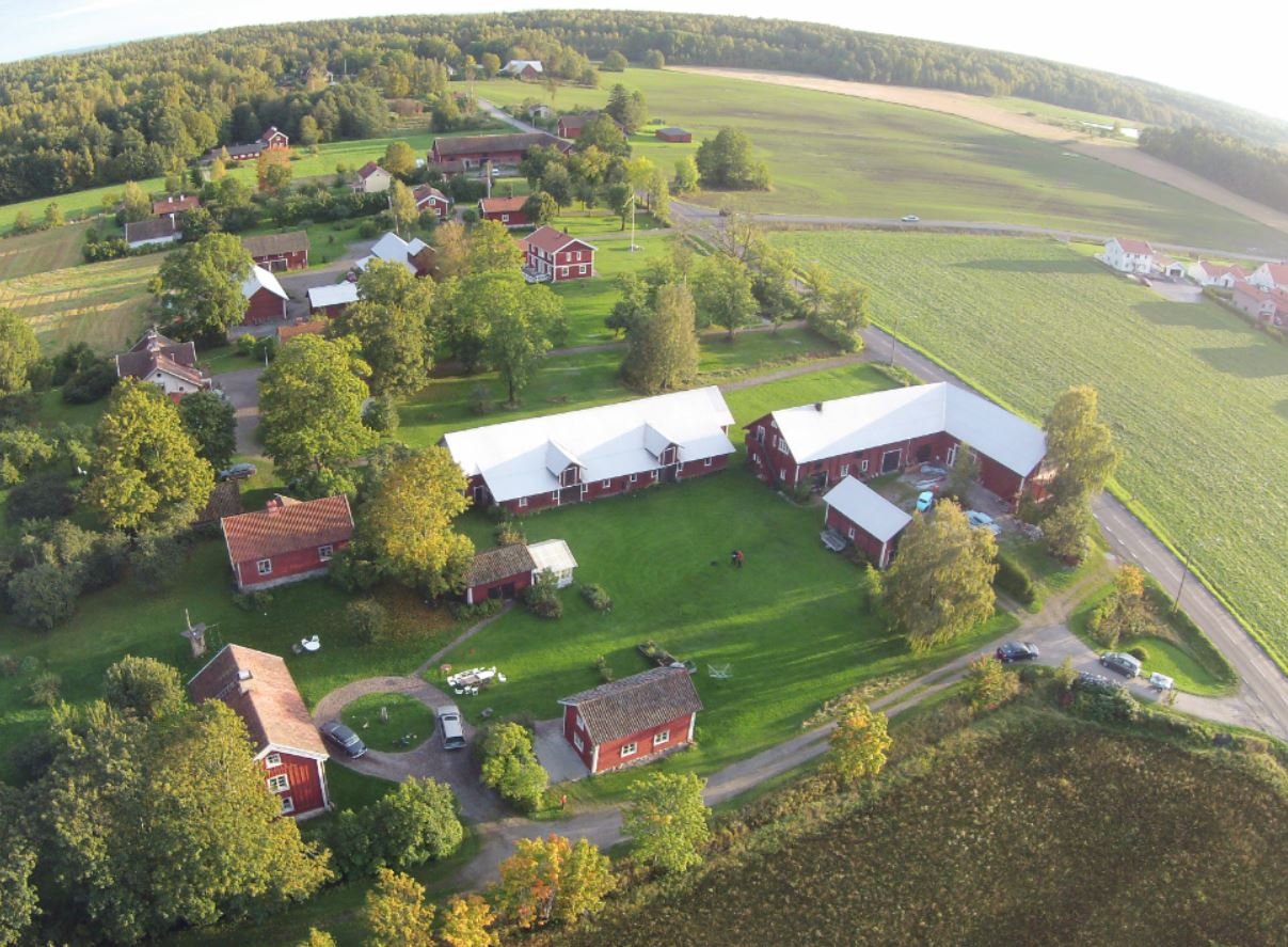 Drönarbild på Ormesta radby